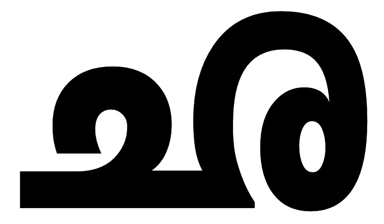 ഛ മലയാളം അക്ഷരം